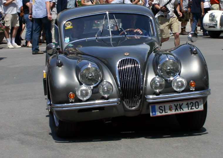 Jaguar XK 120 (1953) Fotografiert von: Softeis bei der Präsentation der Fahrzeuge zum Gaisbergrennen in Salzburg; Juni 2004 GNU-FDL